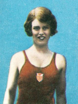 Figurina Campioni dello Sport Panini 1968-69 n.456! Marjorie Gestring